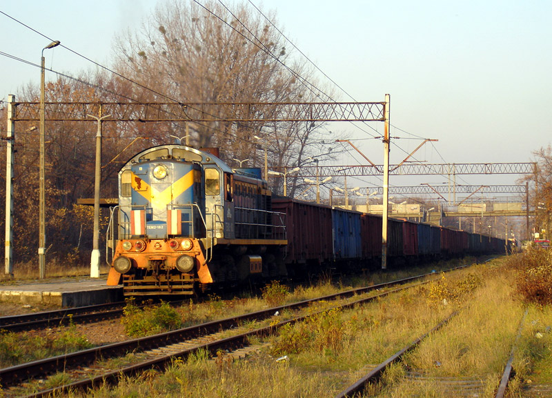 TEM2-182 na popychu ładownego składu węglarek przejeżdża przez stację w Chrzanowie. Na uciągu TEM2-097. 17 listopada 2006.